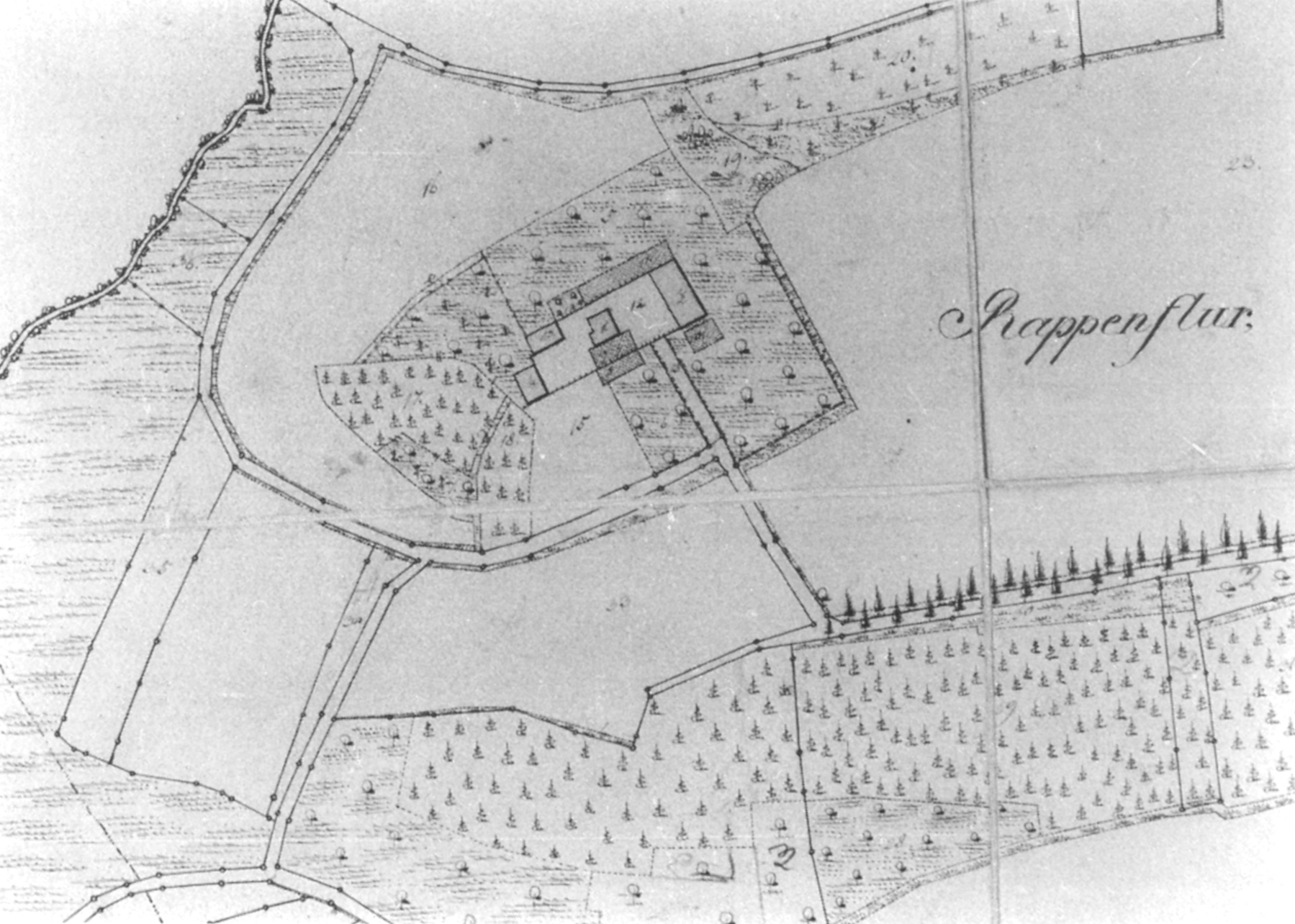 Grundriss des Hofguts Rappenhof bei Weinsberg, 1835, Hohenlohe-Zentralarchiv Neuenstein, Archiv Bartenstein, Domänenkanzlei Bü 322 (Ausschnitt), reproduziert in: Simon M. Haag: Zur Baugeschichte der Oberamtsstadt Weinsberg. Verlag Nachrichtenblatt der Stadt Weinsberg, Weinsberg 1995, ISBN 3-9802689-8-5, S. 222.